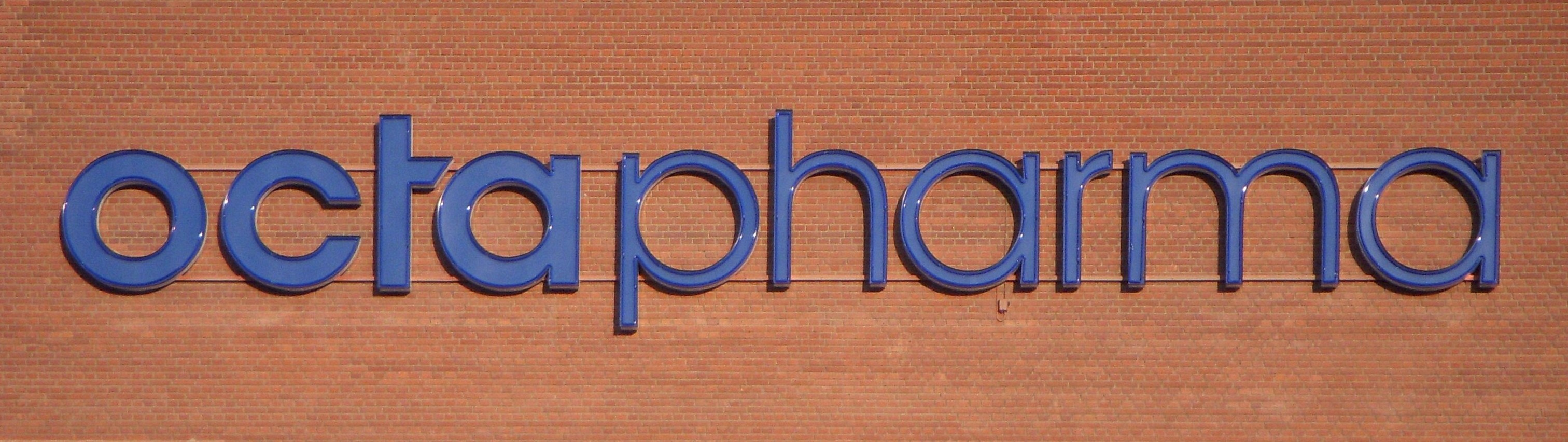 Octapharmas skylt västra Kungsholmen